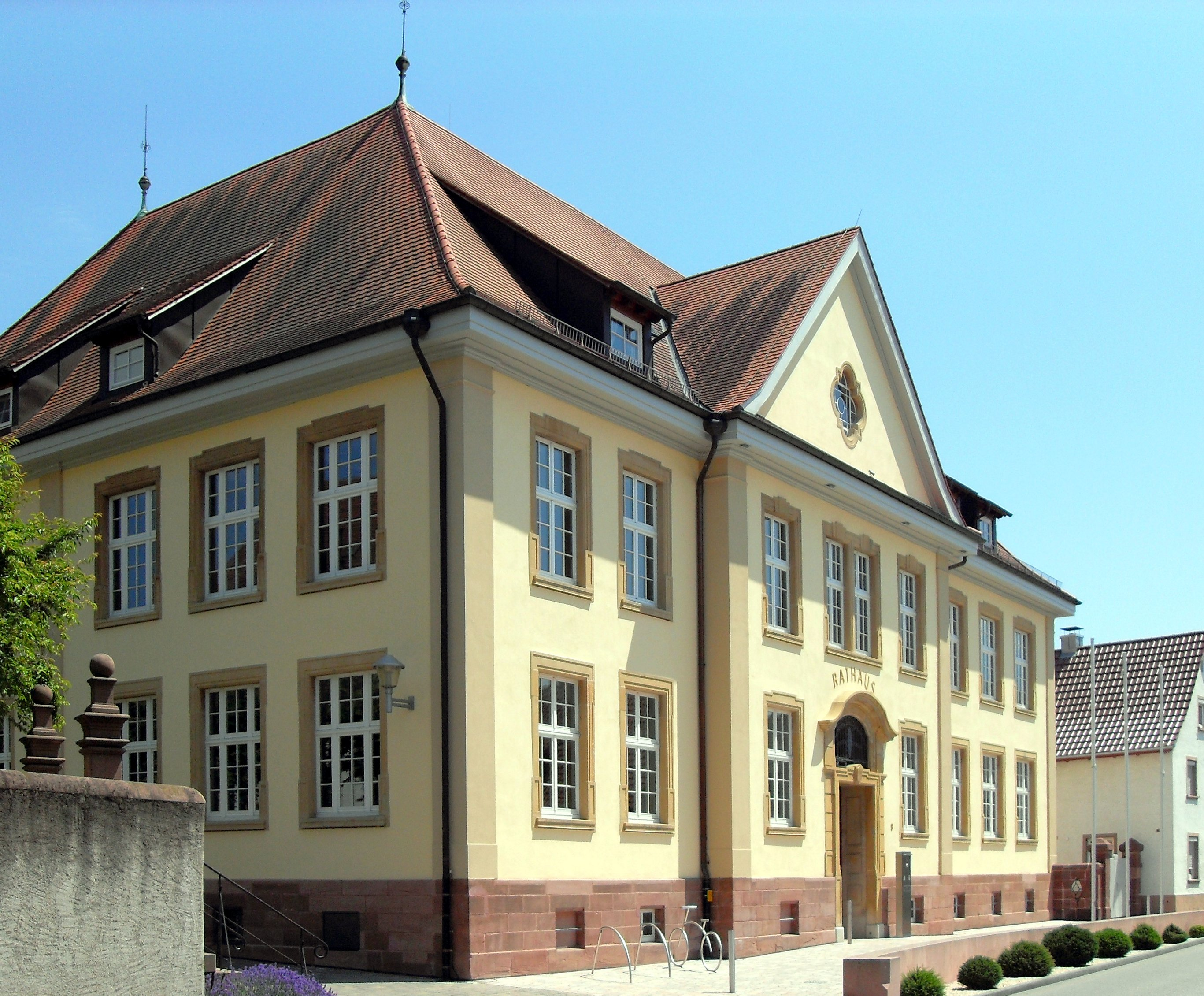 Rathaus in Wyhl am Kaiserstuhl